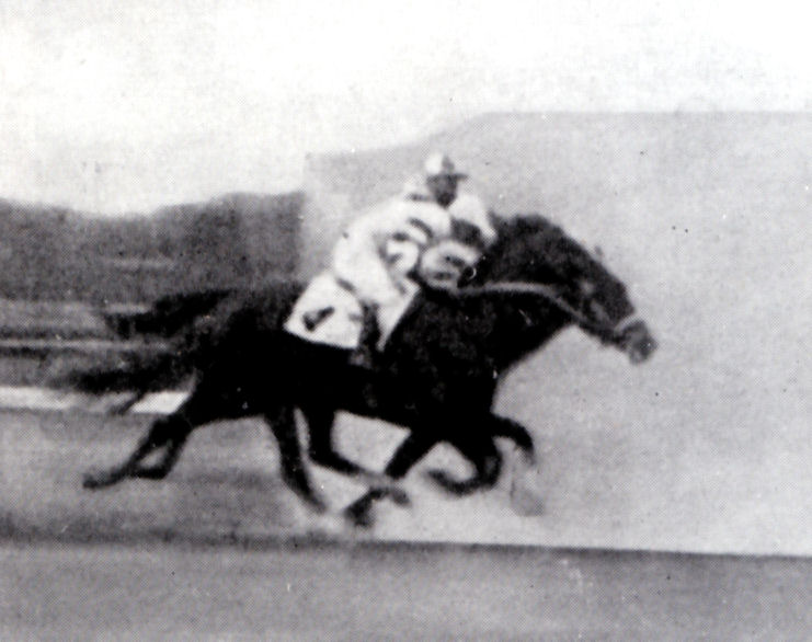 トクマサと伊藤正四郎（第5回東京優駿にて）。